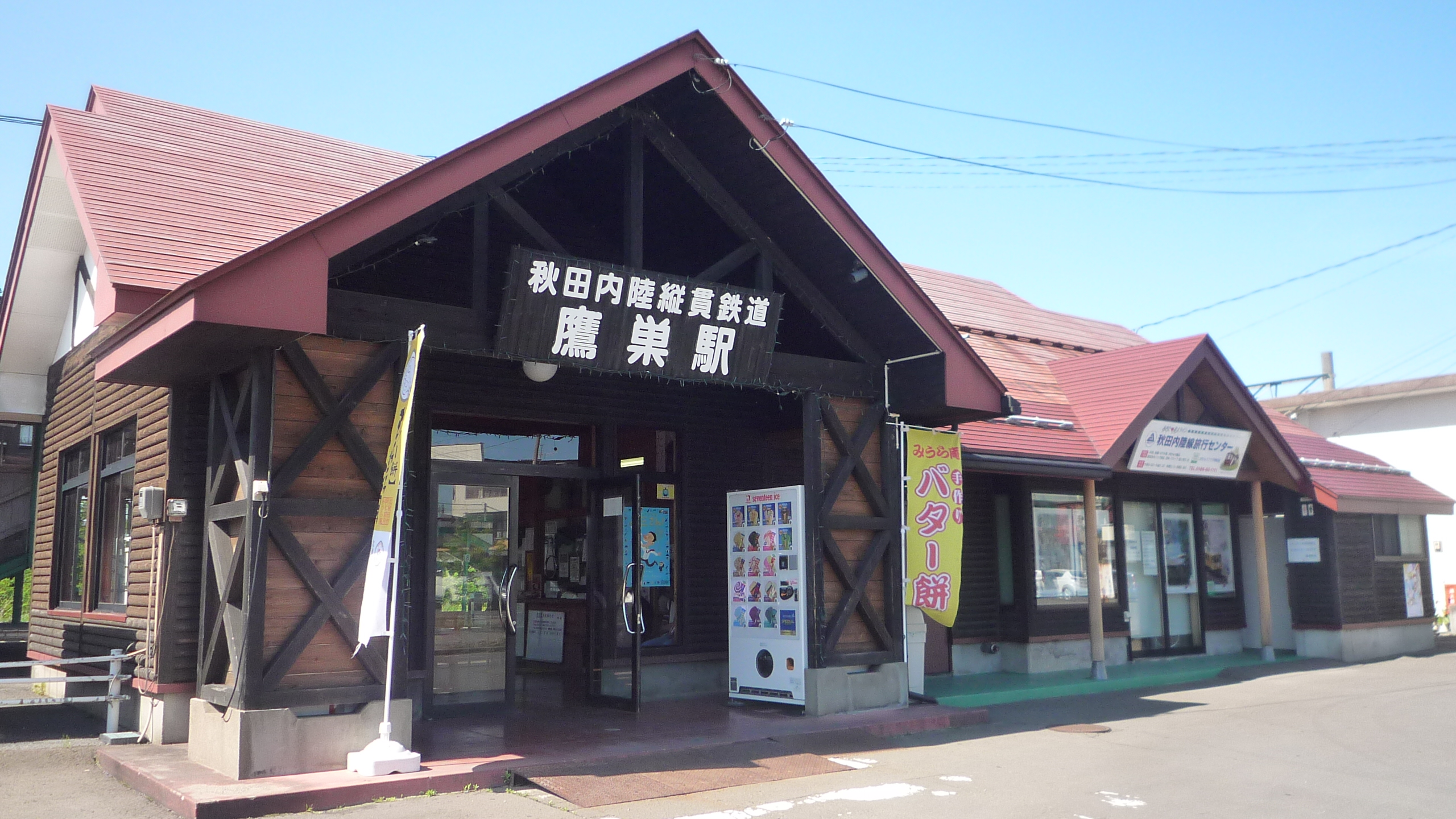 秋田内陸線 鷹巣駅（秋田県北秋田市）